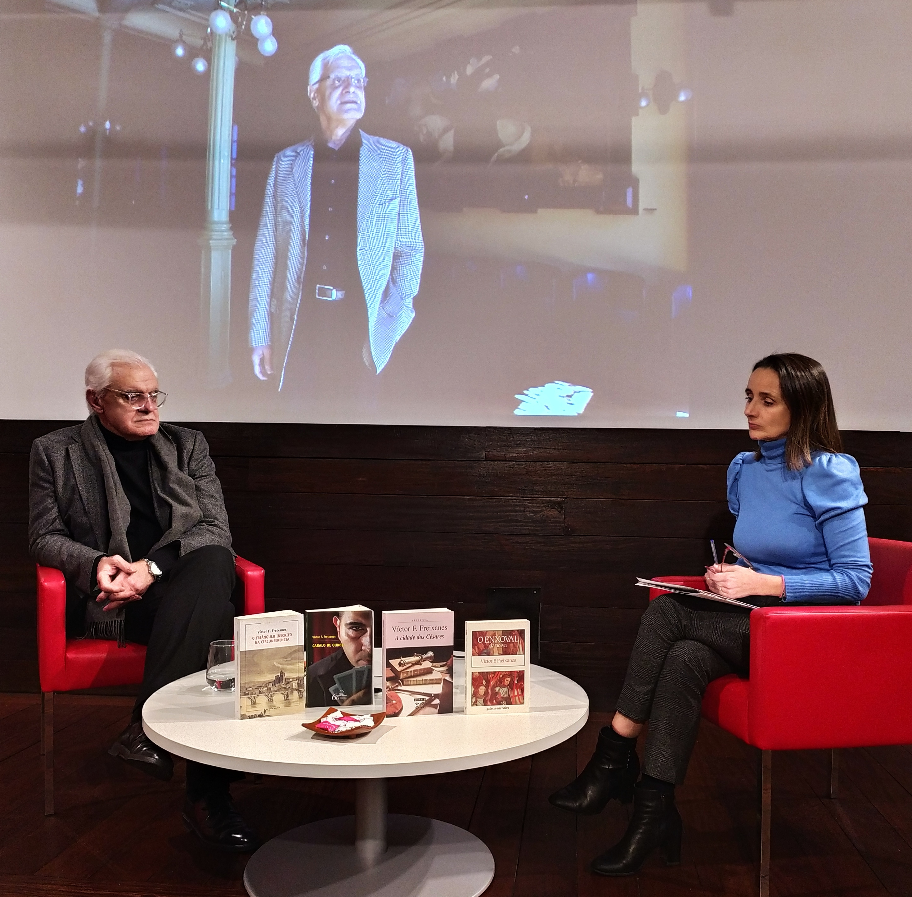 Víctor Freixanes e María Varela conversando na Casa das Campás de Pontevedra